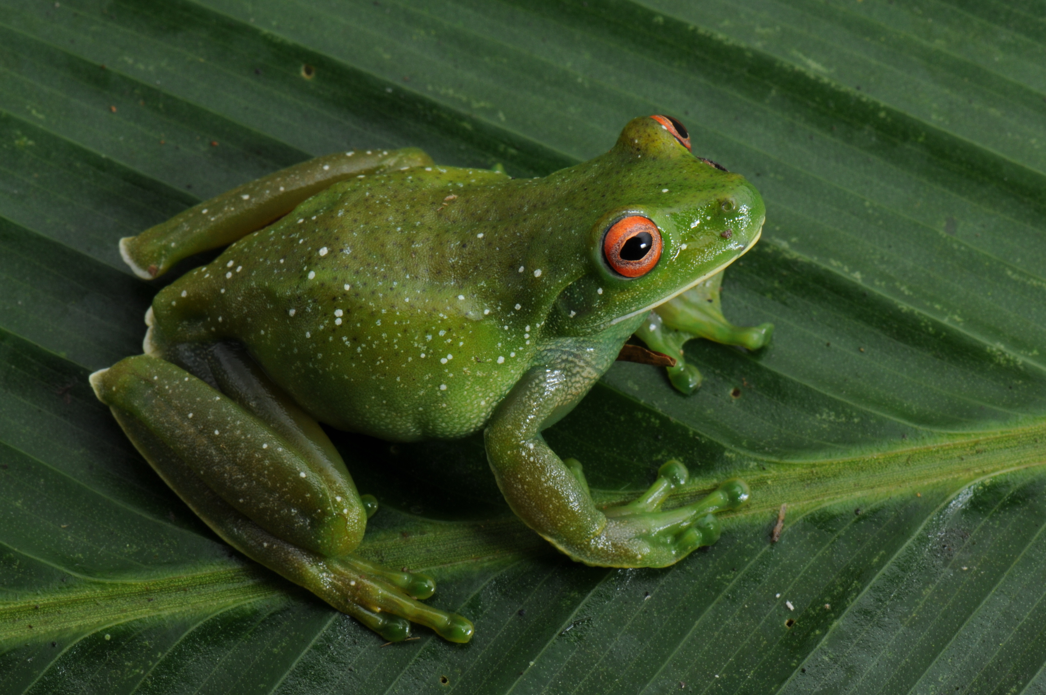 Perereca flautinha - Aplastodiscus leucopygius - Espécie endêmica da Mata Atlântica.